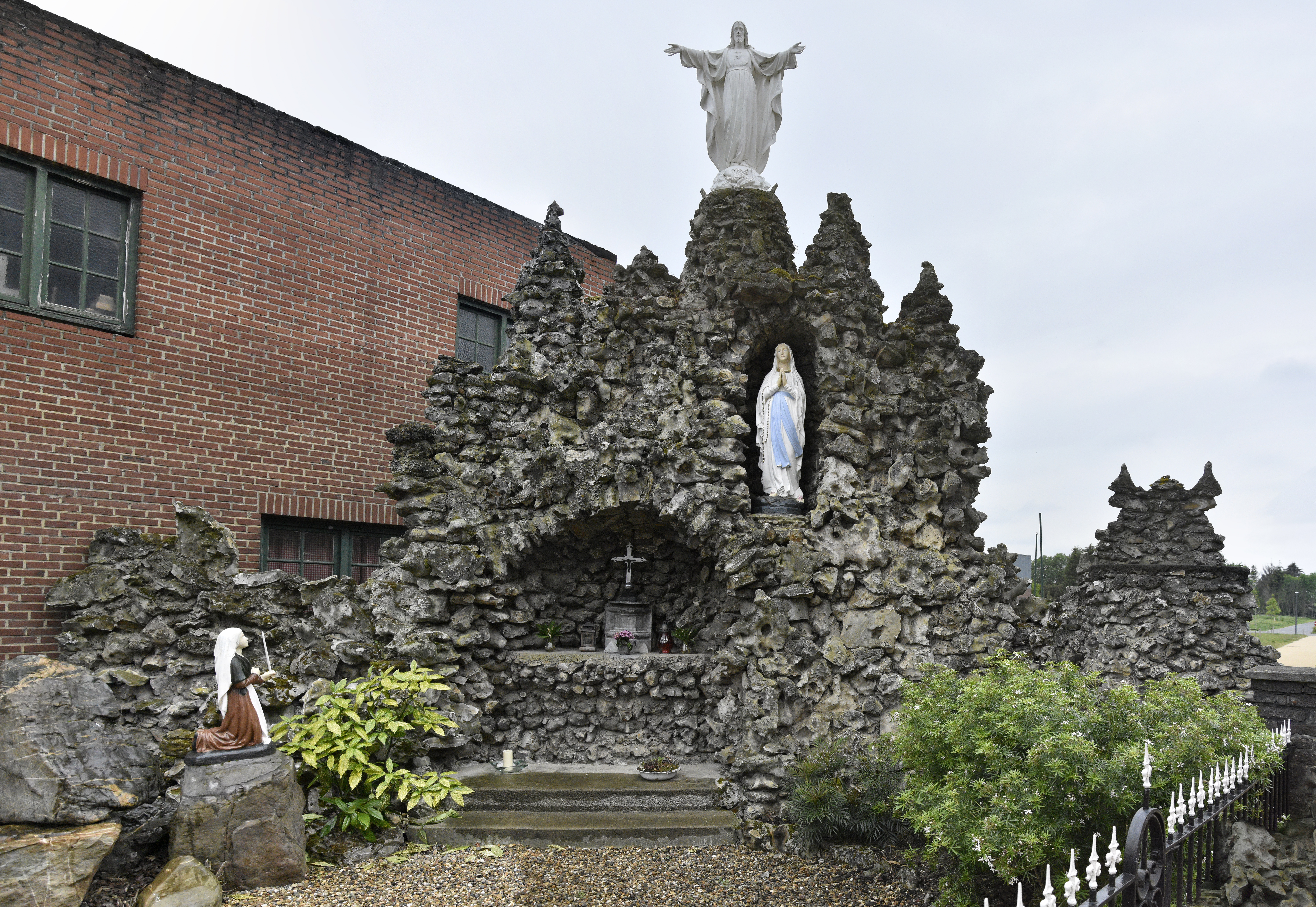 Lourdesgrot Uikhoven 17-05-2019 17-17-04